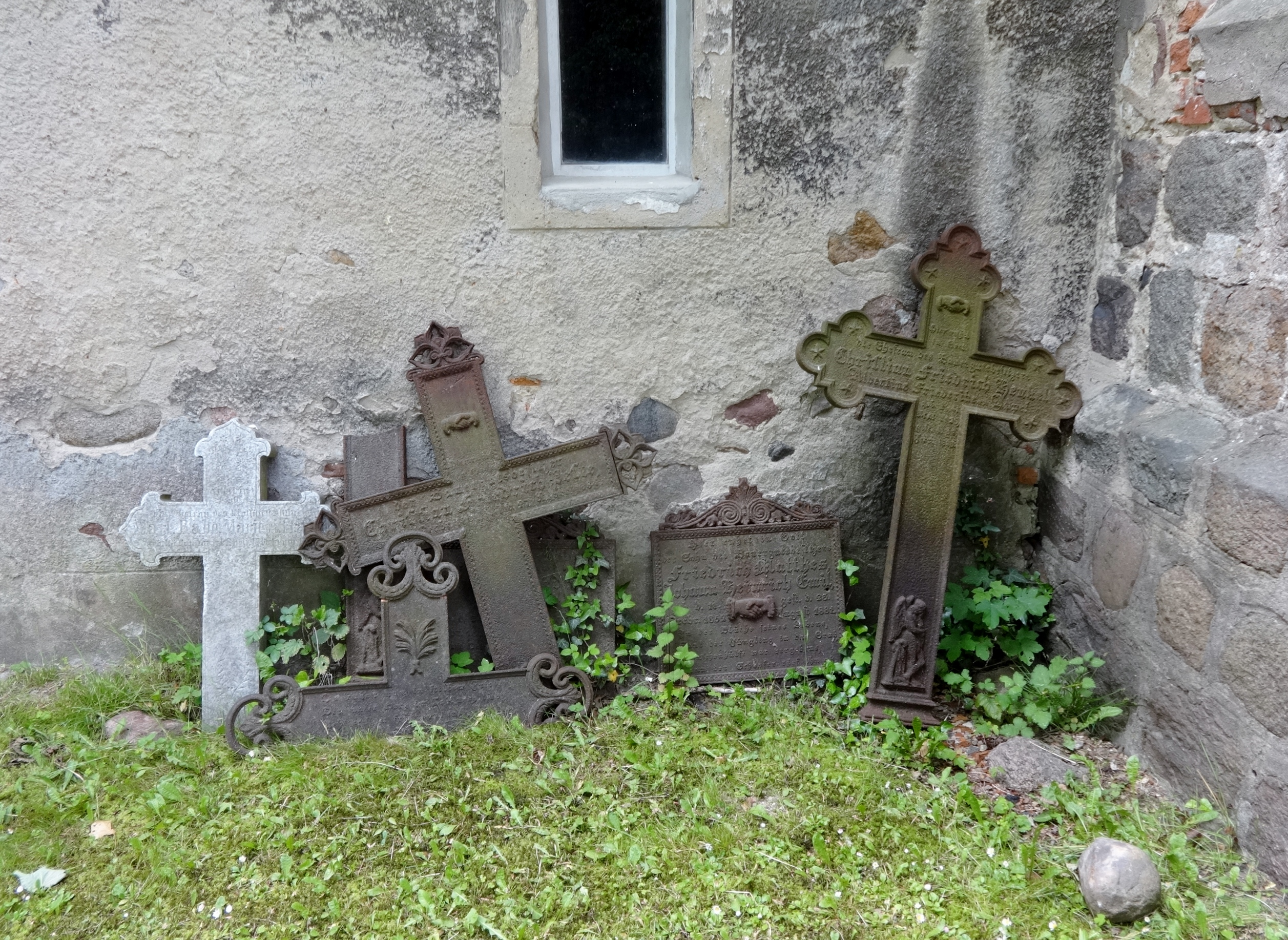 Die Kirche Rehfelde ist eine Chorquadratkirche, die in der zweiten Hälfte des 13. Jahrhunderts als regelmäßig geschichteten Feldsteinen errichtet wurde. Der Turm entstand zu einem späteren Zeitpunkt. In der flach gedeckten Kirche befinden sich eine Kanzel, ein Altar sowie eine Orgelempore aus dem Jahr 1722 sowie eine pokalförmige Fünte aus Rüdersdorfer Kalkstein.